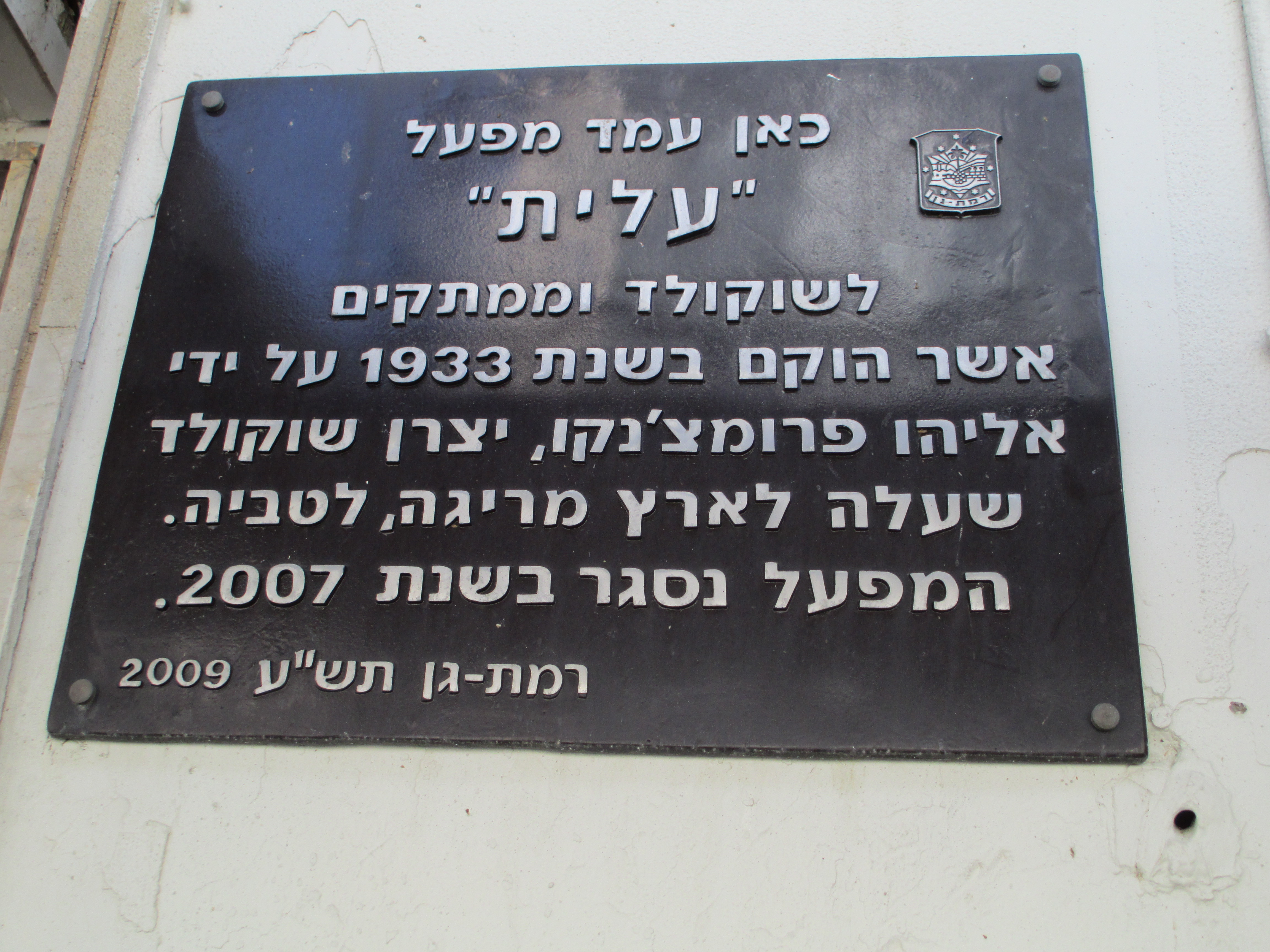 לוחית זיכרון על הבניין ההיסטורי של בית החרושת עלית ברמת גן